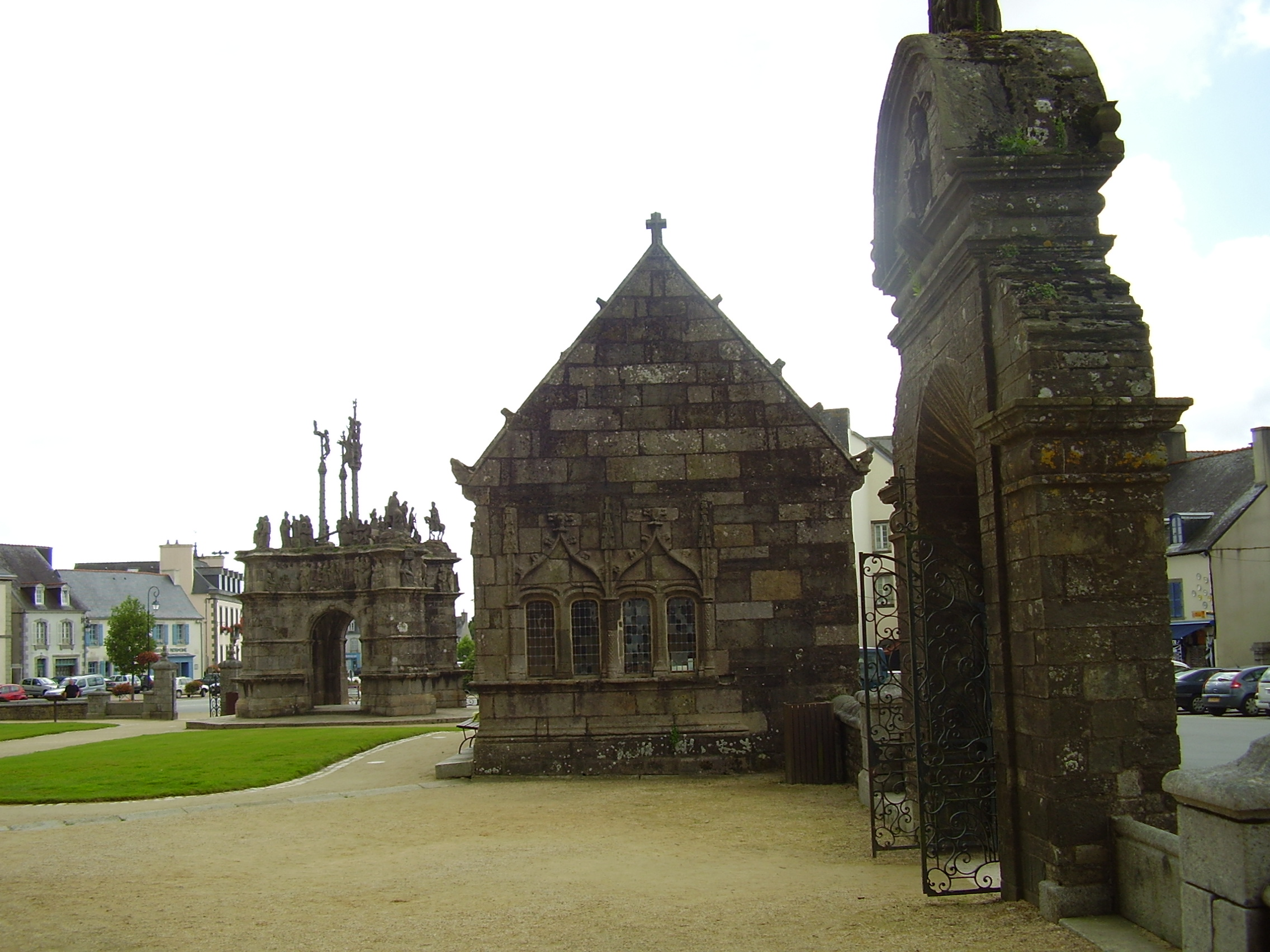 Pleyben, Pfarrbezirk mit monumentaler Calvaire und Kirche, Frankreich; Calvaire